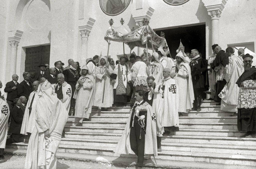 Título original: Peregrinación española al XXX Congreso Eucarístico Internacional en Cartago (2/26) Localización: Guipúzcoa